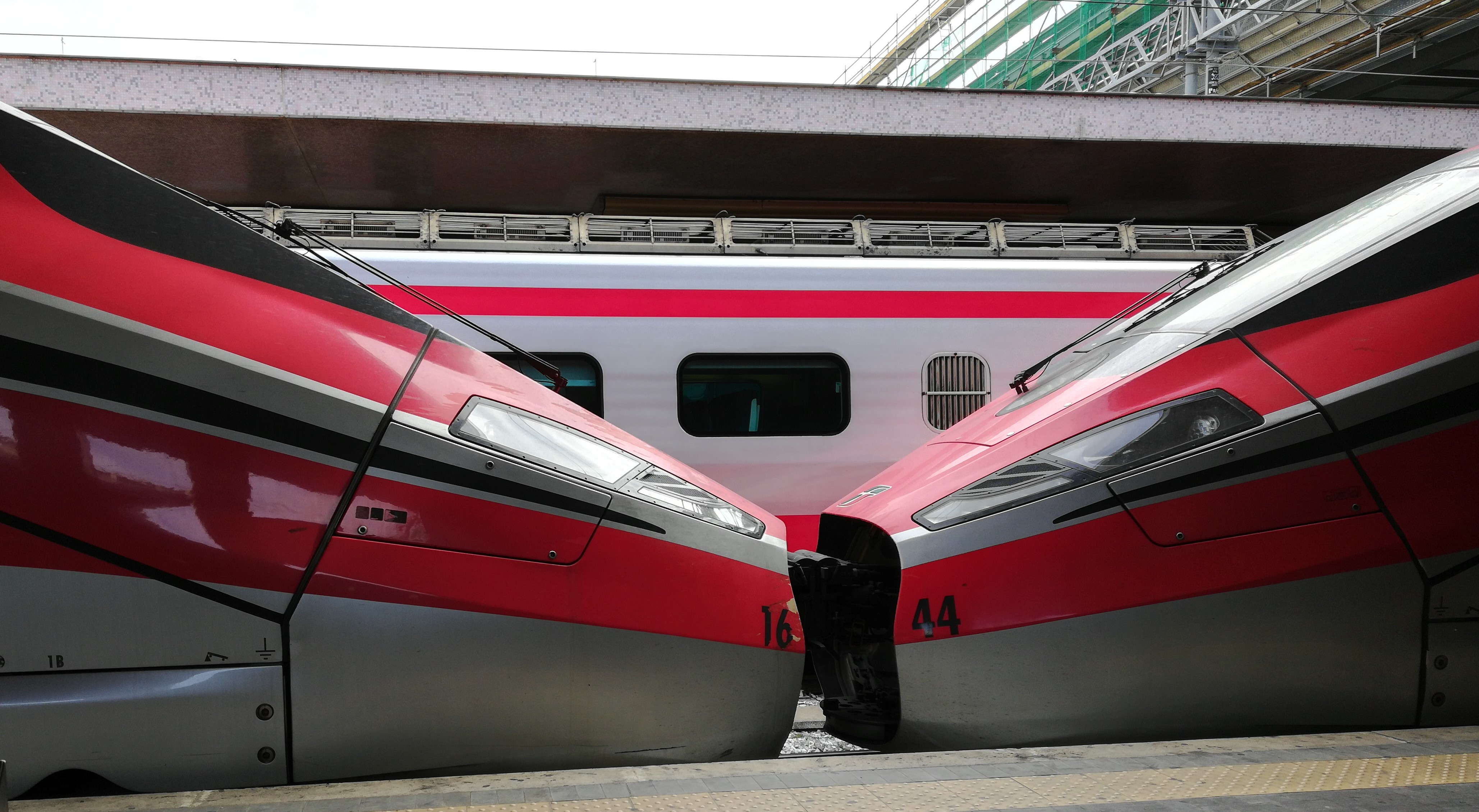 Doppio convoglio ETR1000